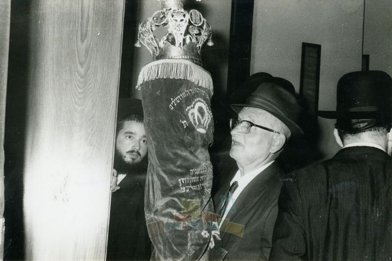 משה פראגר ממייסדי הבנין ומי שנדב את המגרש, רוקד עם ספר תורה בחנוכת הבית של כולל גור בבני ברק.